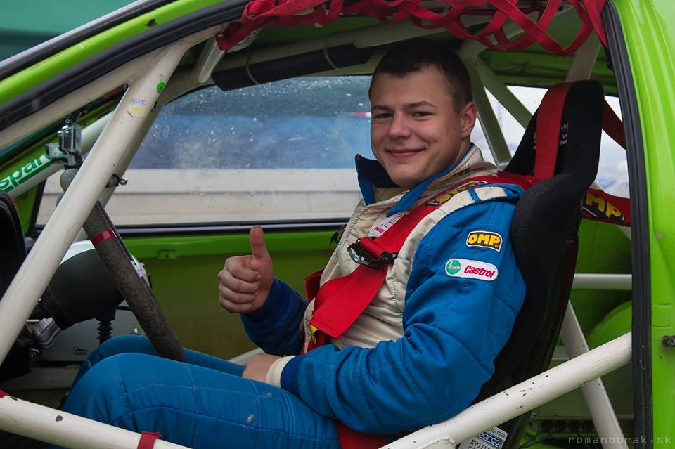 Slovenská republika